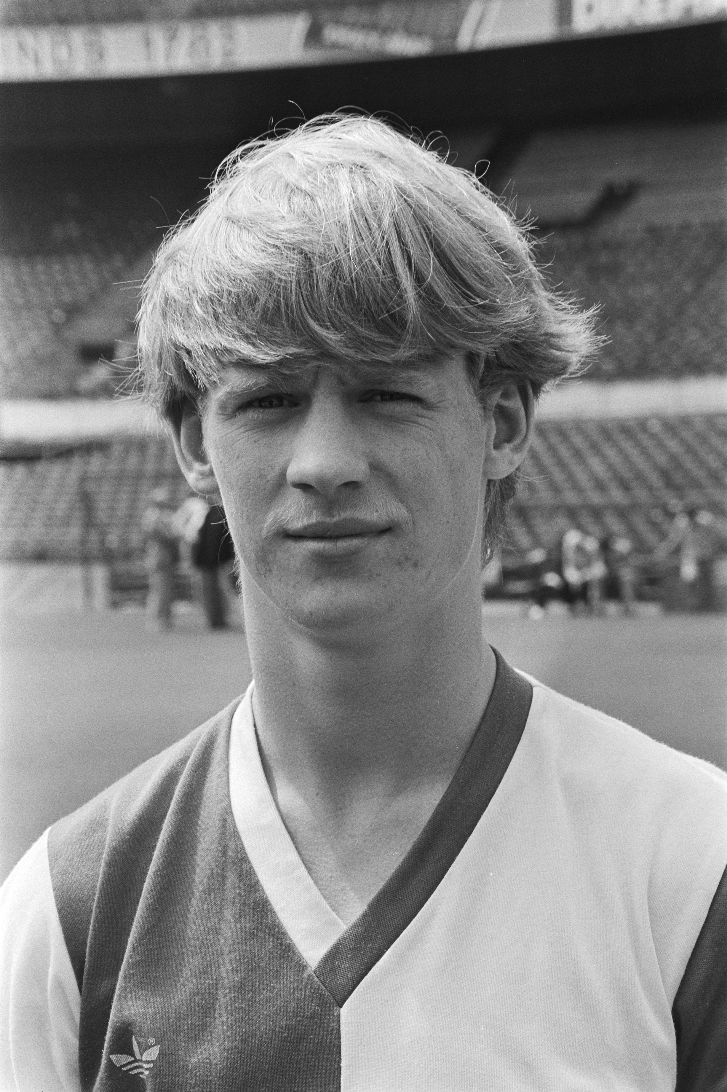 Collectie / Archief : Fotocollectie Anefo Reportage / Serie : [ onbekend ] Beschrijving : Persdag Feijenoord; Mario Been , kop Datum : 29 juli 1982 Trefwoorden : sport, voetbal Instellingsnaam : Feyenoord Fotograaf : Dijk, Hans van / Anefo Auteursrechthebbende : Nationaal Archief Materiaalsoort : Negatief (zwart/wit) Nummer archiefinventaris : bekijk toegang 2.24.01.05 Bestanddeelnummer : 932-2615